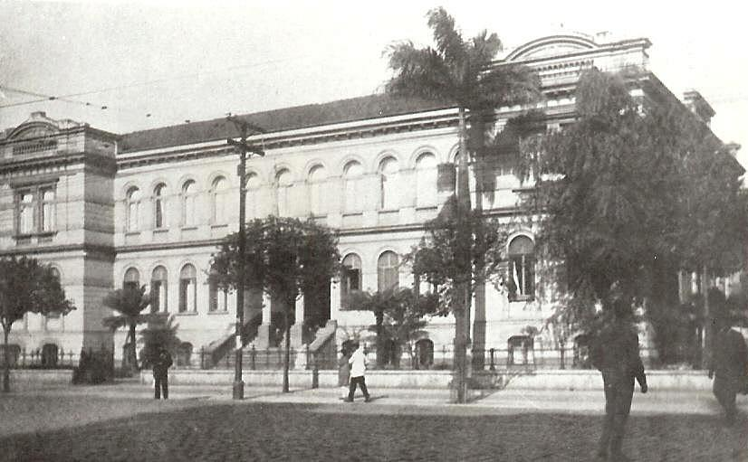 Escola Estadual Romão Puiggari, no Brás, São Paulo.